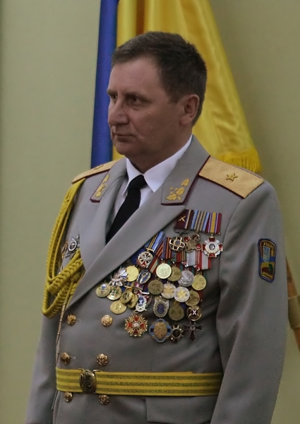 Львов, военный институт, ректор генерал П.П.Ткачук